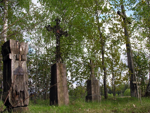 Maigų kaimo kapinaitės, Mažeikių raj., Mažeikių apylinkės seniūnija Foto: Algirdas, 2006 m. gegužės 20 d.